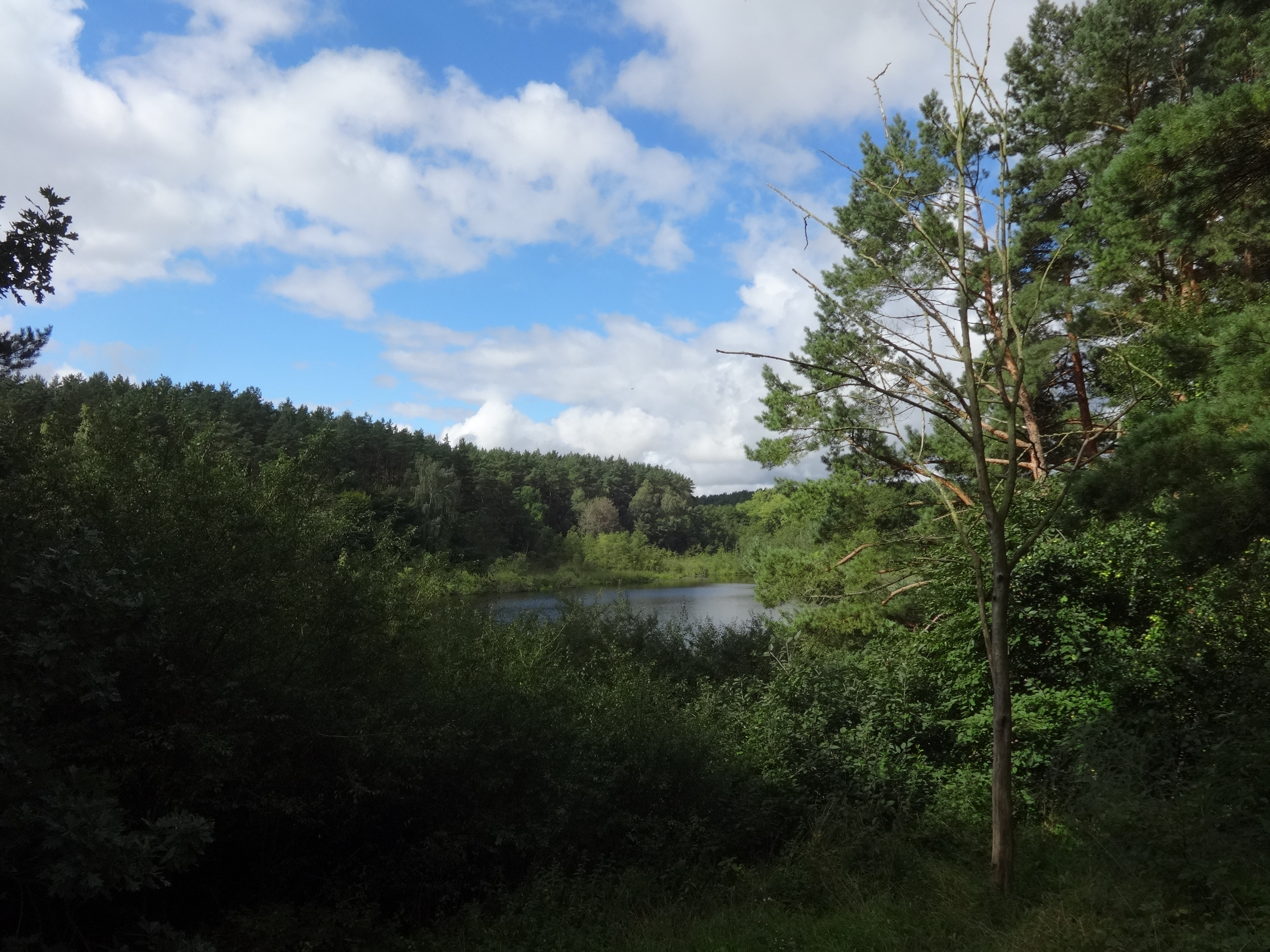 Schwanenteich in Hohendorf, ein Ortsteil von Wolgast in Vorpommern-Greifswald